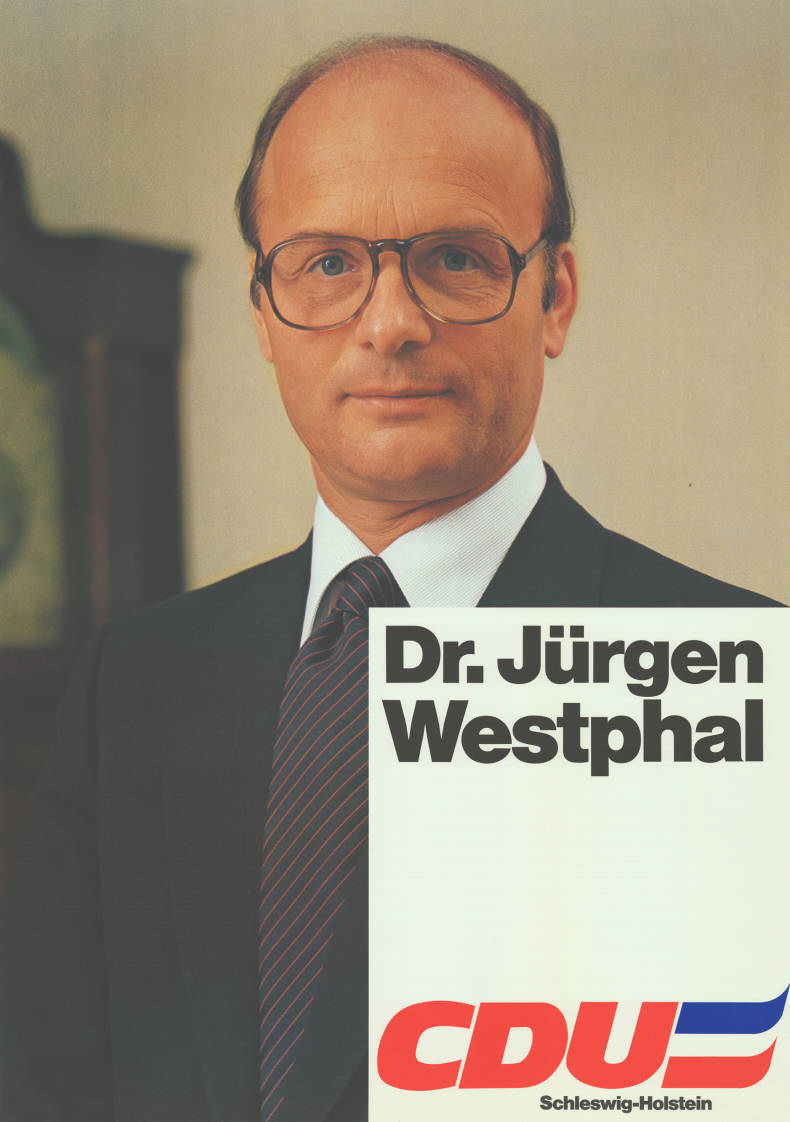 Dr. Jürgen Westphal CDU Schleswig-HolsteinAbbildung:FotoPlakatart:Kandidaten-/Personenplakat mit PorträtAuftraggeber:Verantw.: CDU Schleswig-Holstein Objekt-Signatur:10-012 : 439Bestand:Landtagswahlplakate Schleswig-Holstein (10-012)GliederungBestand10-18:Landtagswahlplakate Schleswig-Holstein (10-012) » Landtagswahl am 29.4.1979 » AnkündigungsplakateLizenz:KAS/ACDP 10-012 : 439 CC-BY-SA 3.0 DE